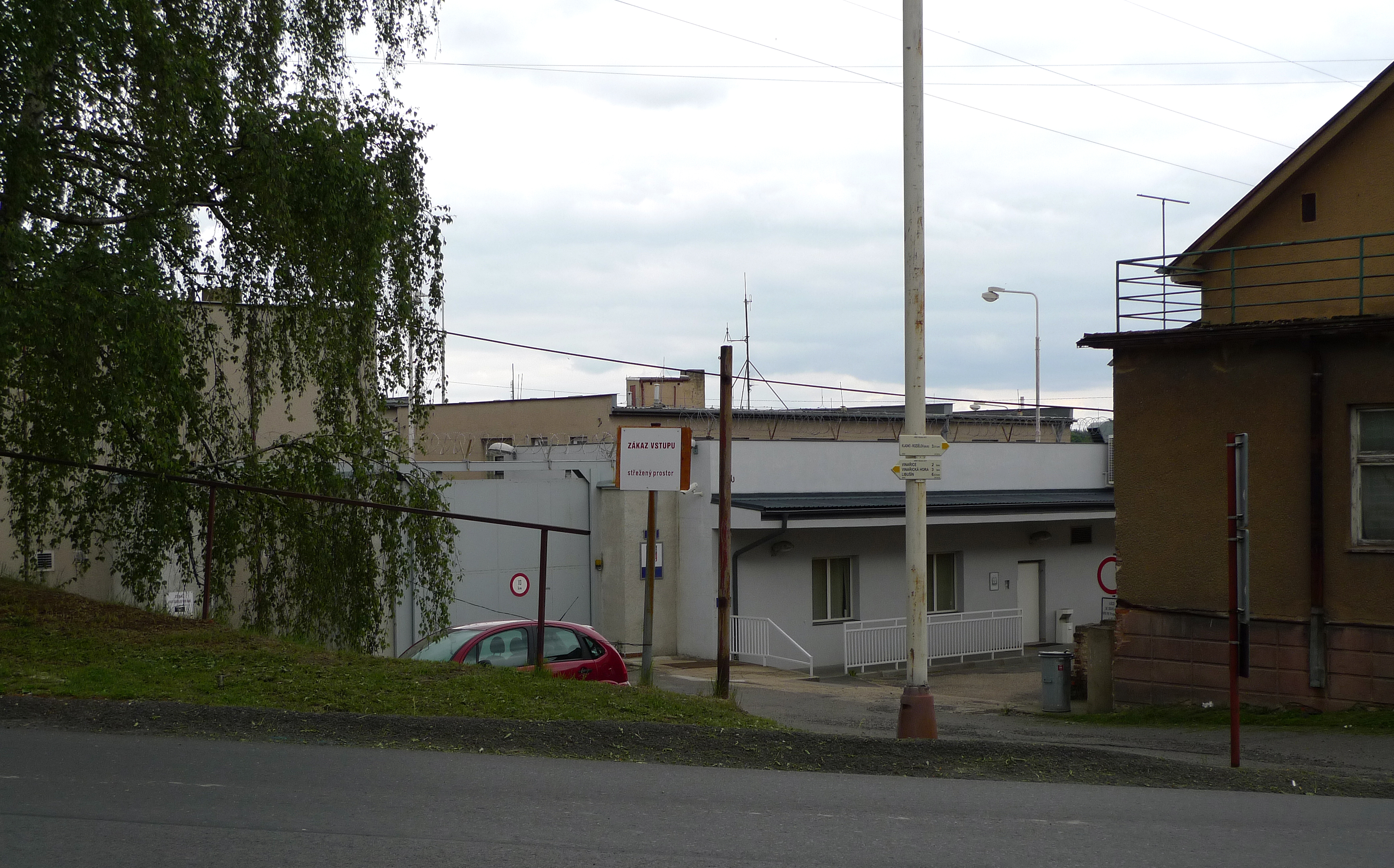 Věznice Vinařice u Kladna